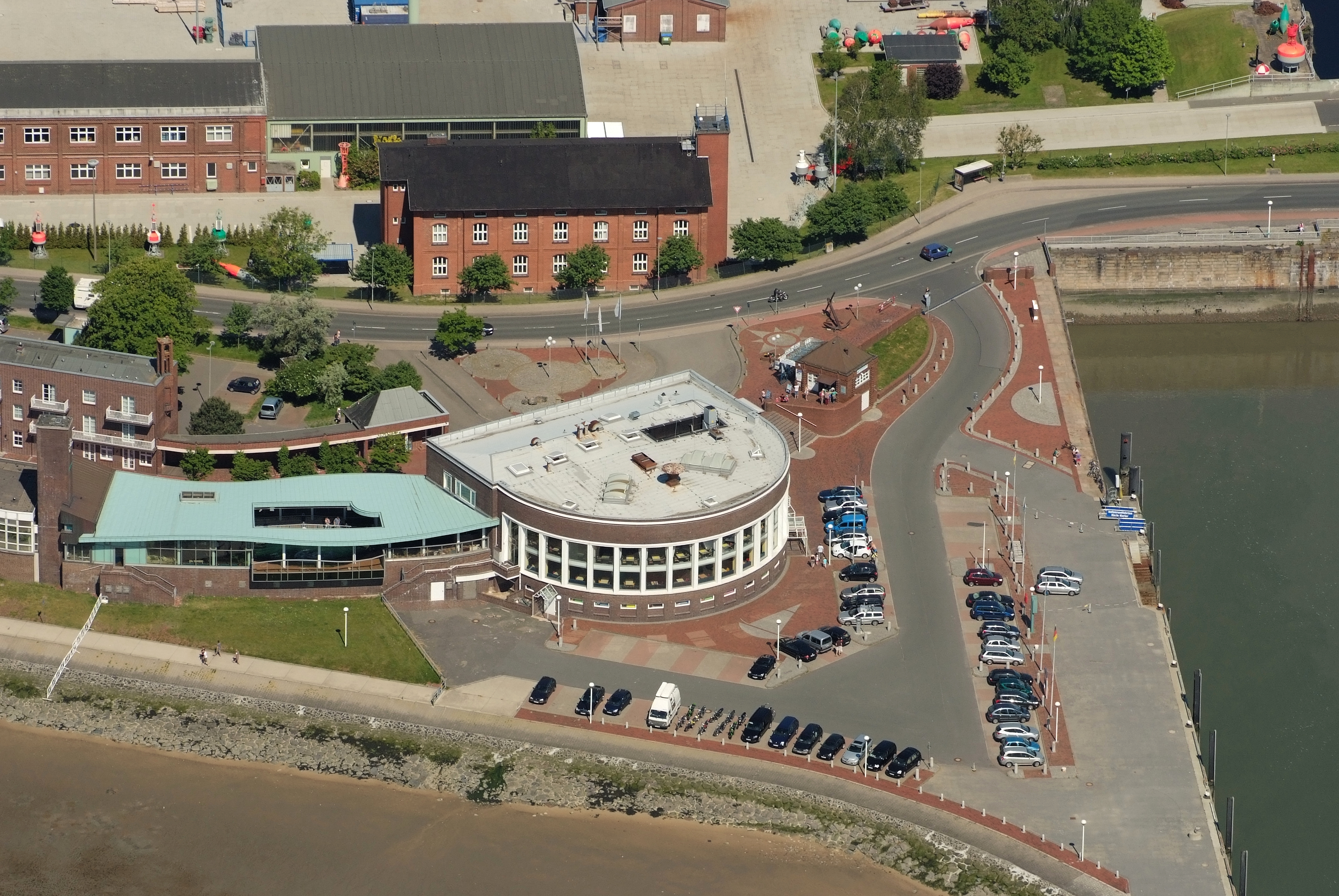 Fotoflug vom Flugplatz Nordholz-Spieka über Cuxhaven und Wilhelmshaven Aquarium Wilhelmshaven, Bullermek, rechts die Helgoland-Pier